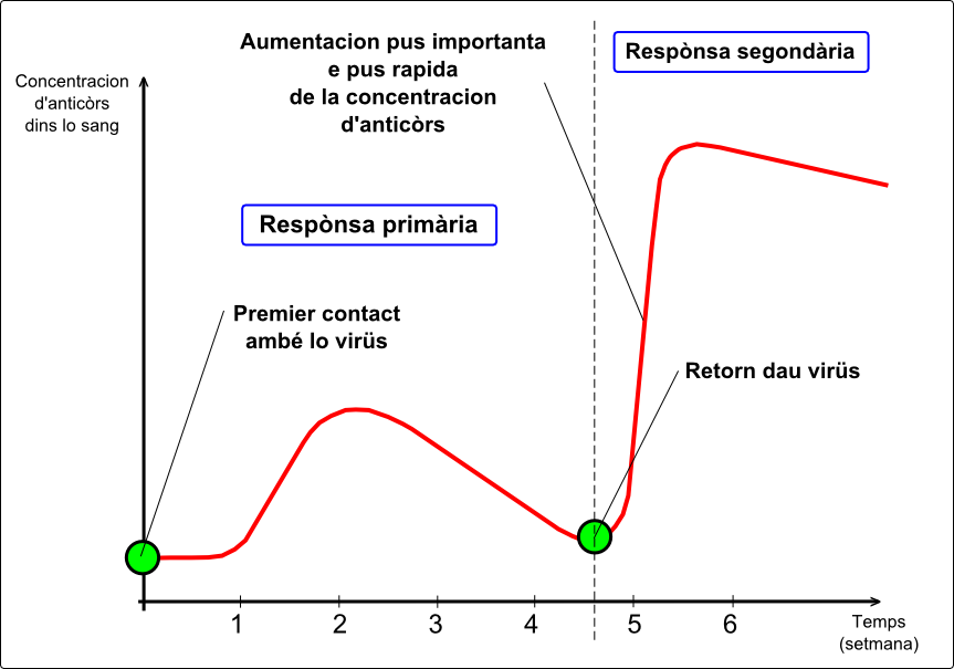 Diferéncia entre la premiera e la segonda respònsa immunitària còntra un meme virüs.